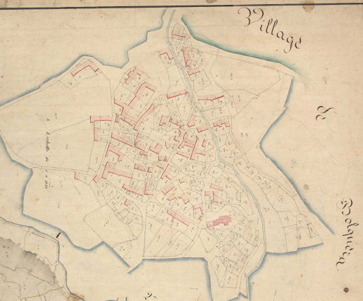 Mapa del Cadastre Napolèonic del 1812.